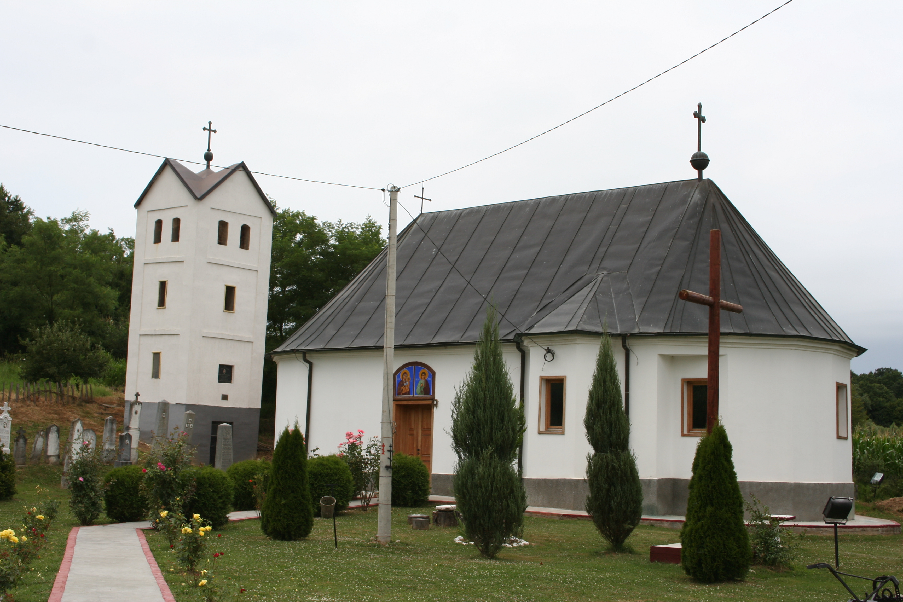 Crkva Sv. Stefana, Svileuva